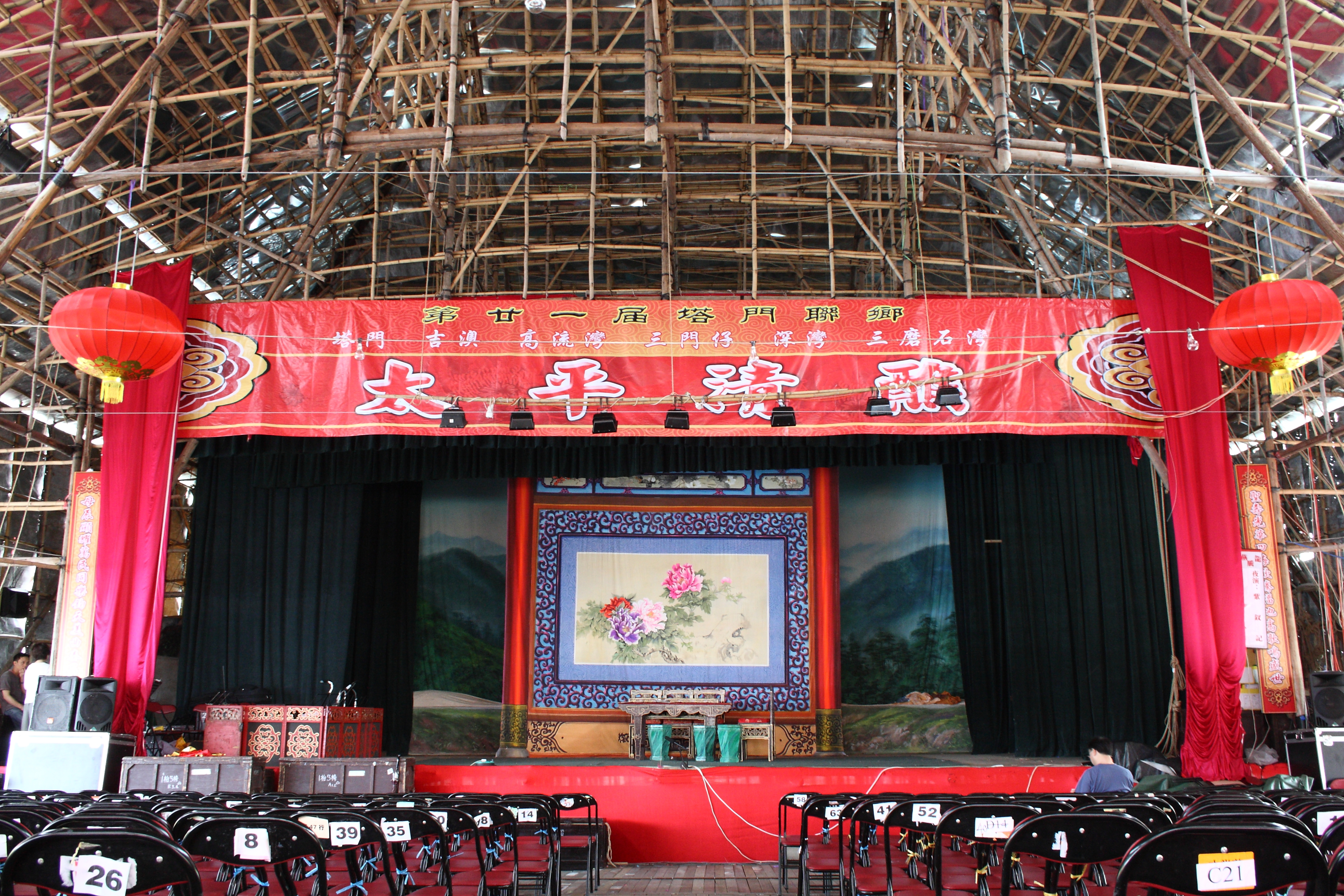 中文（香港）: 塔門太平清醮的戲棚